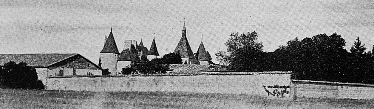 Dictionnaire illustré des communes du département du Rhône. Tome 1 / par MM. E. de Rolland et D. Clouzet.